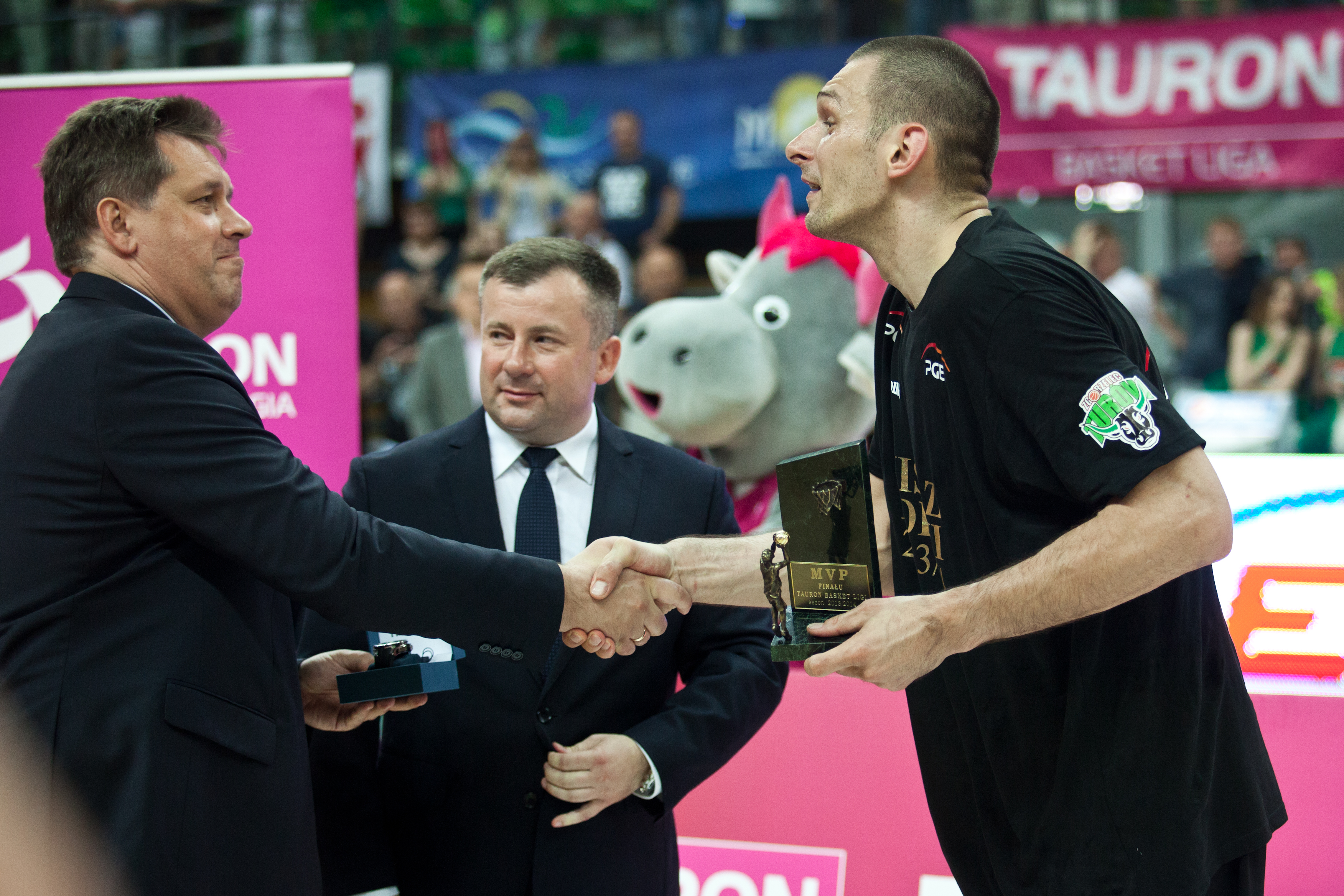 Filip Dylewicz PGE Turów Zgorzelec odbiera nagrodę dla MVP finałów Tauron Basket Ligi